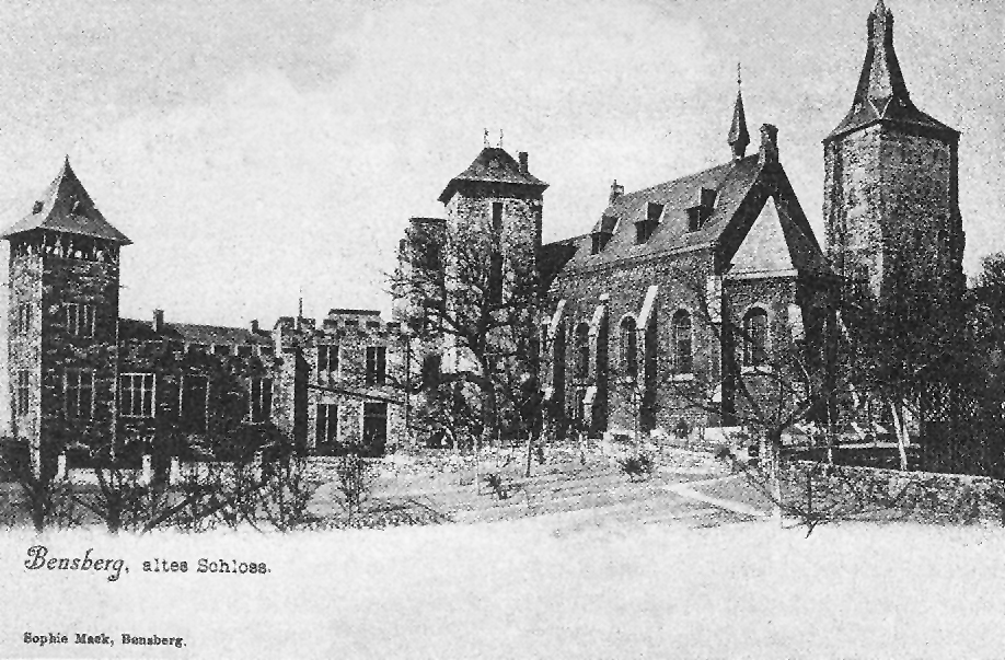 Postkarte vom Alten Schloss Bensberg